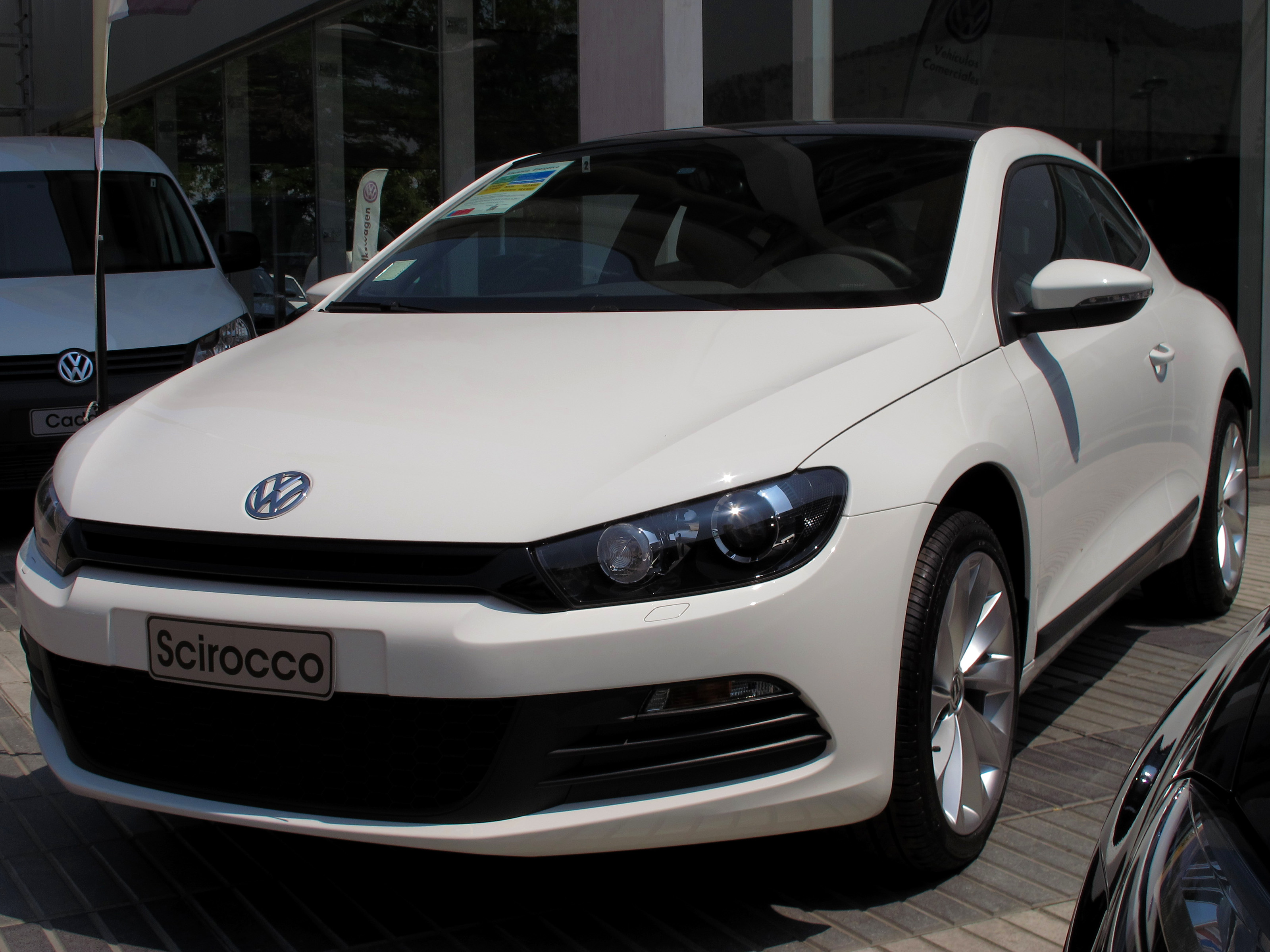 Volkswagen Scirocco 2.0 TSi Tempesta 2015